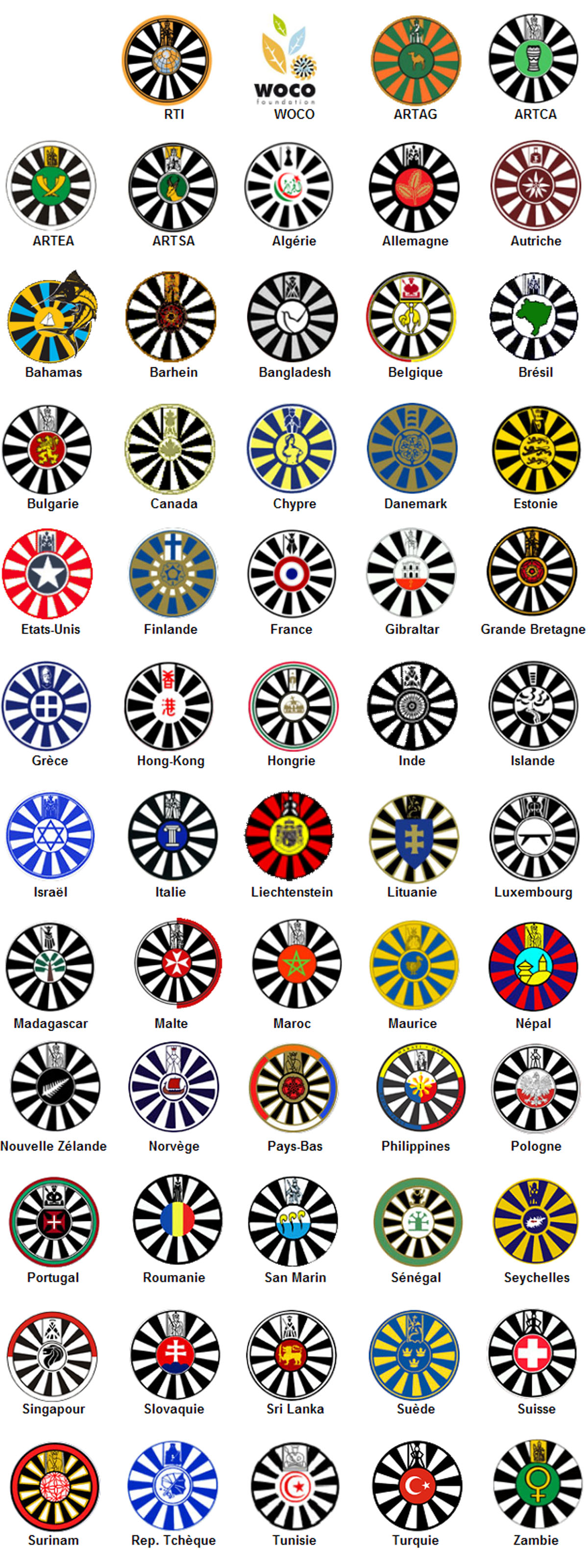 ensemble des logos de la Table Ronde